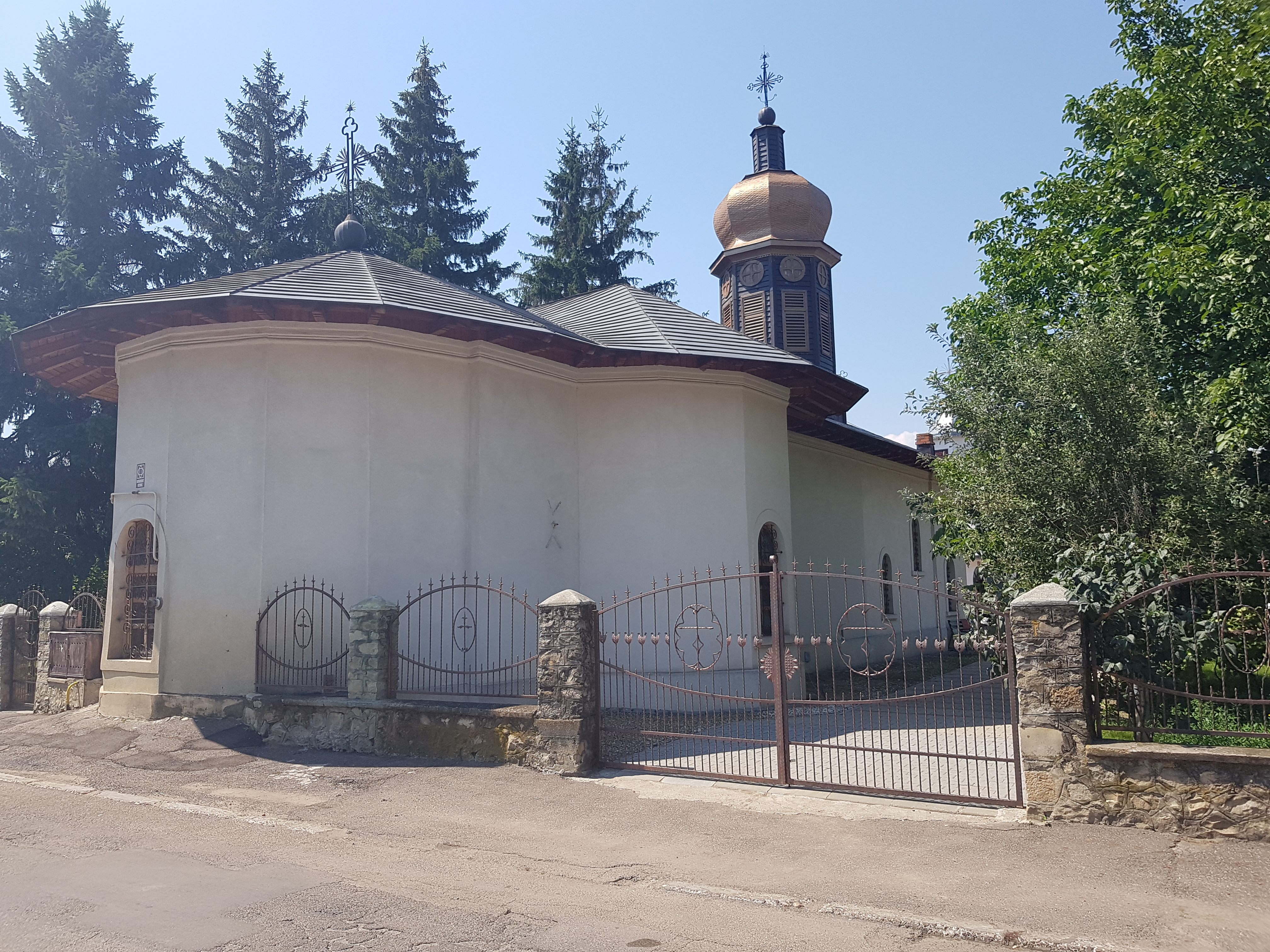 Biserica „Adormirea Maicii Domnului”